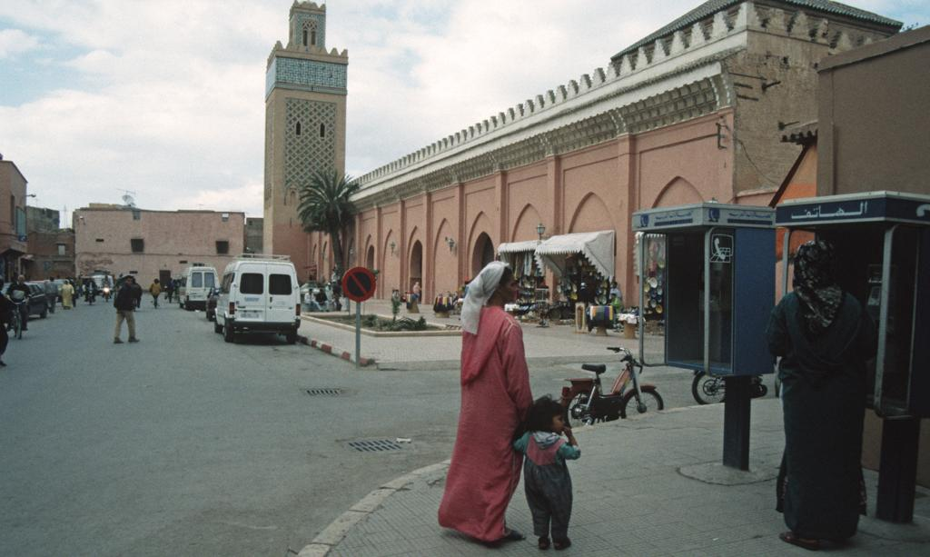 Kasbah Moschee